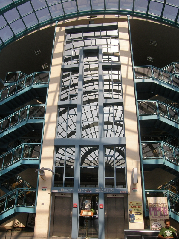 Pescara Airport